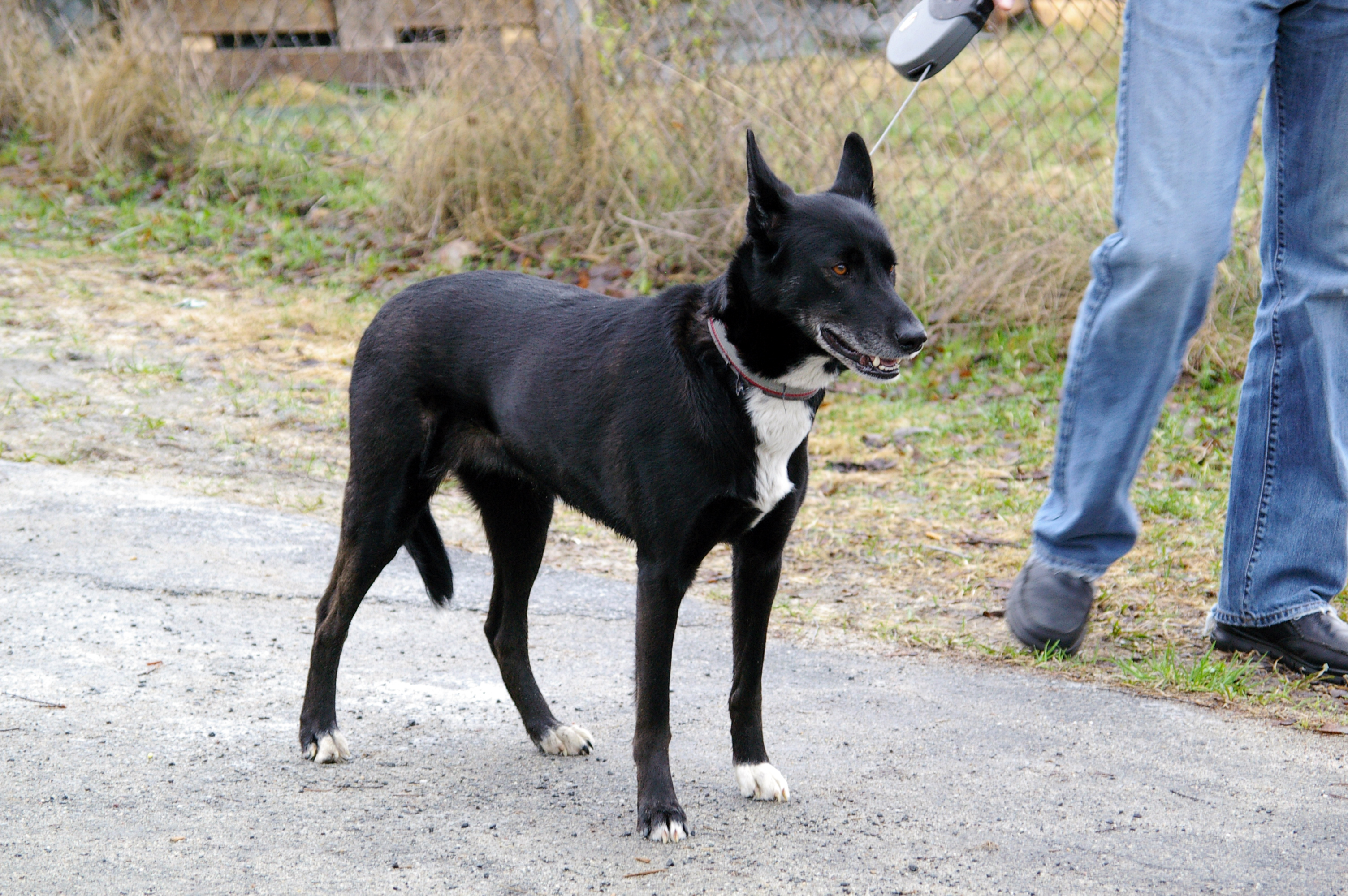 Alaskan Husky (bitch)